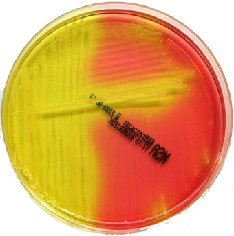 S.aureus sur gélose de Chapman (image personnelle) Philippinjl 7 février 2007 à 14:18 (CET)